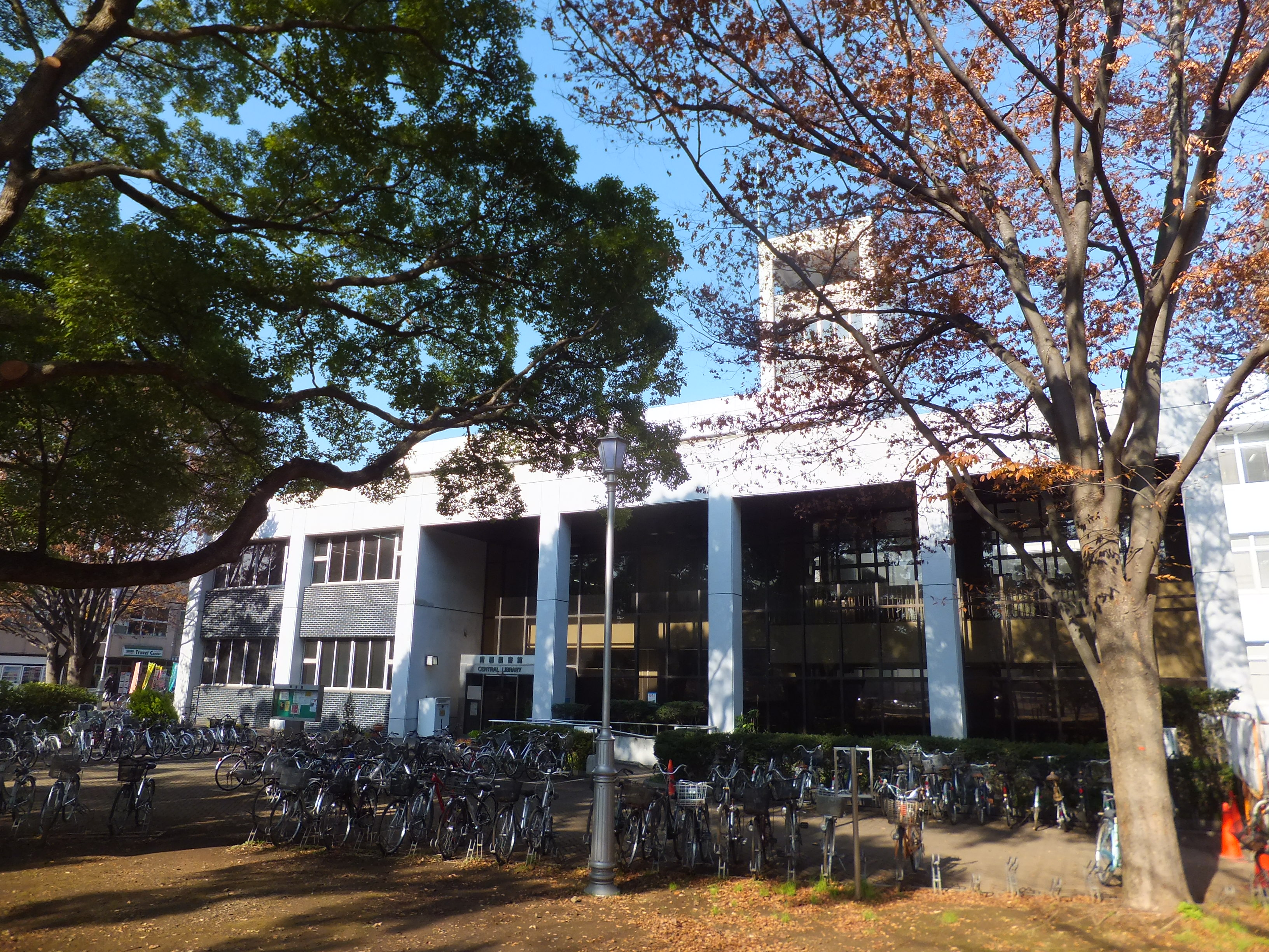 千葉大学附属図書館K棟(もと新館)